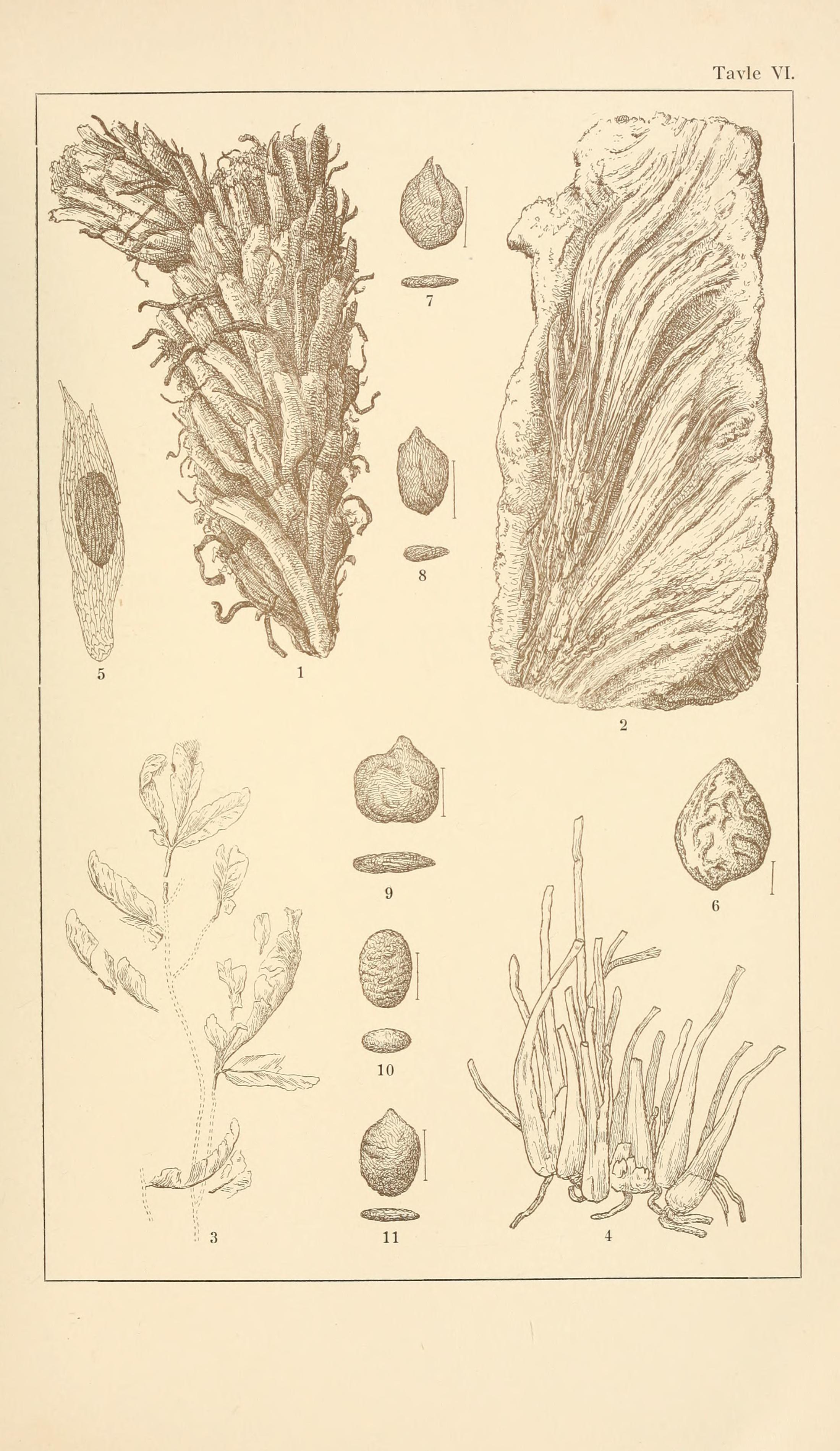 Bidrag til Danmarks tertiaere og diluviale flora. Af N. Hartz.